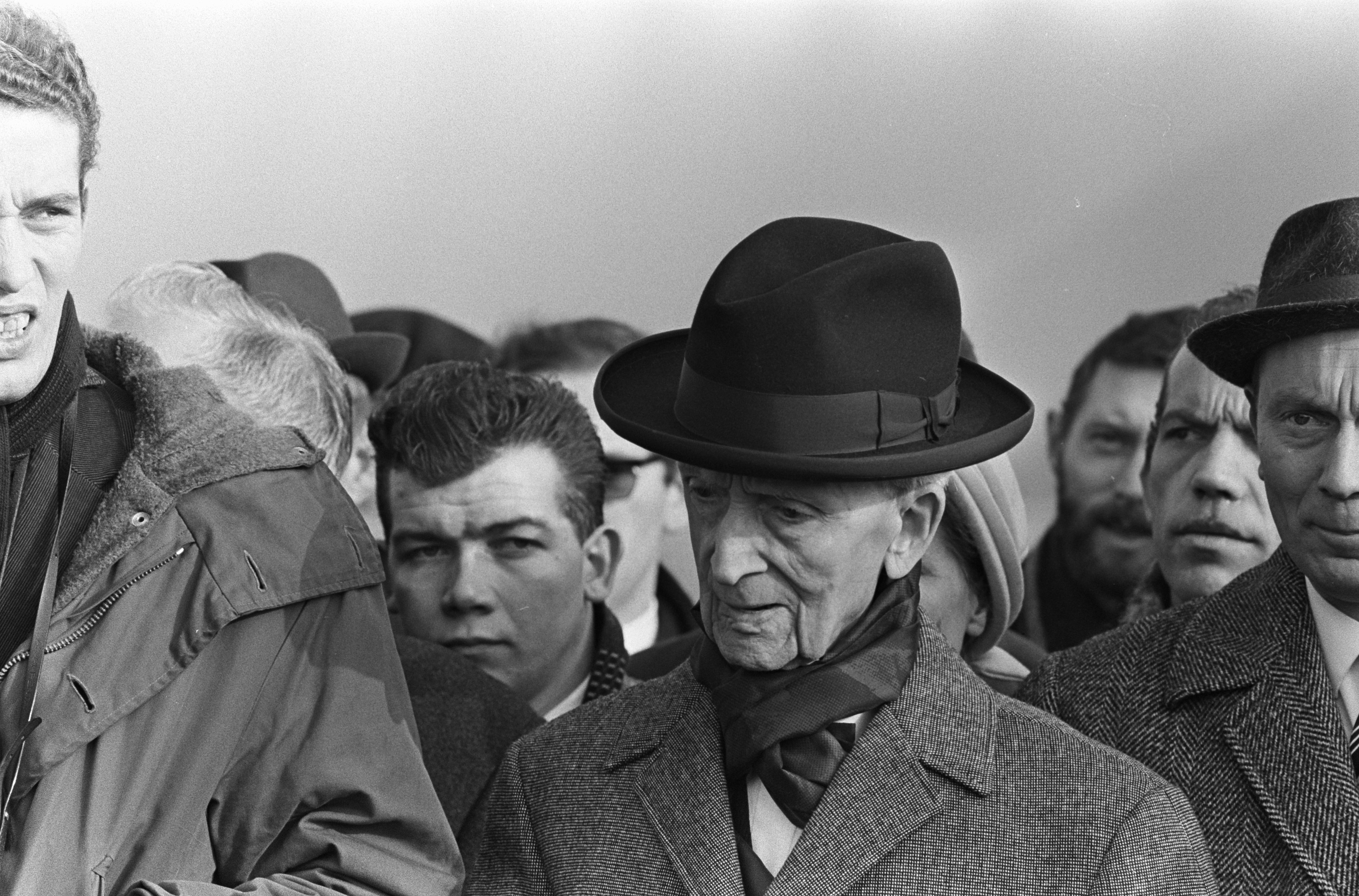 Begrafenis mijnwerker in Zwartberg (Belgie). Camille Huysmans bij begrafenis, 3 februari 1966